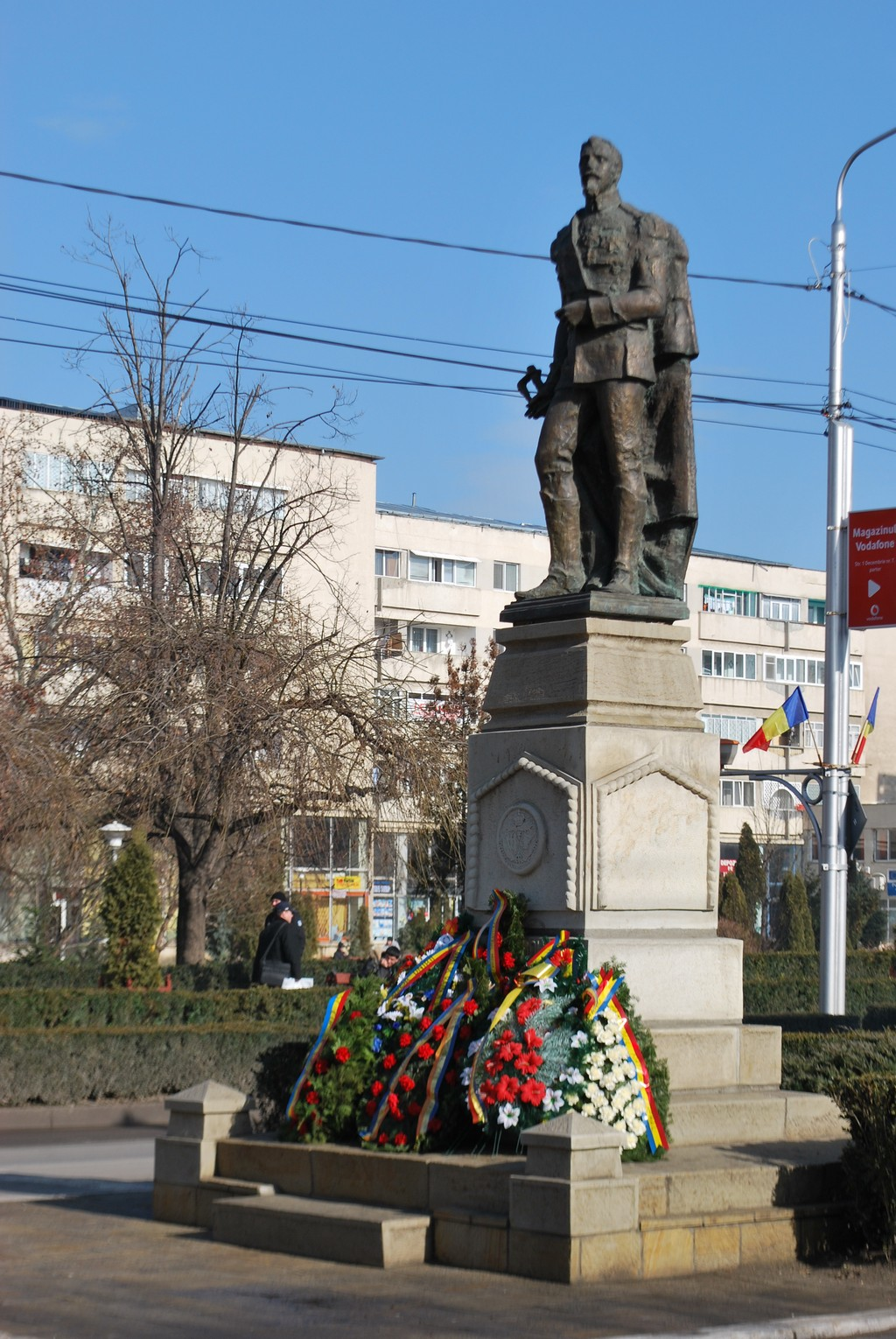 Statuia lui cuza din centrul municipiului barlad